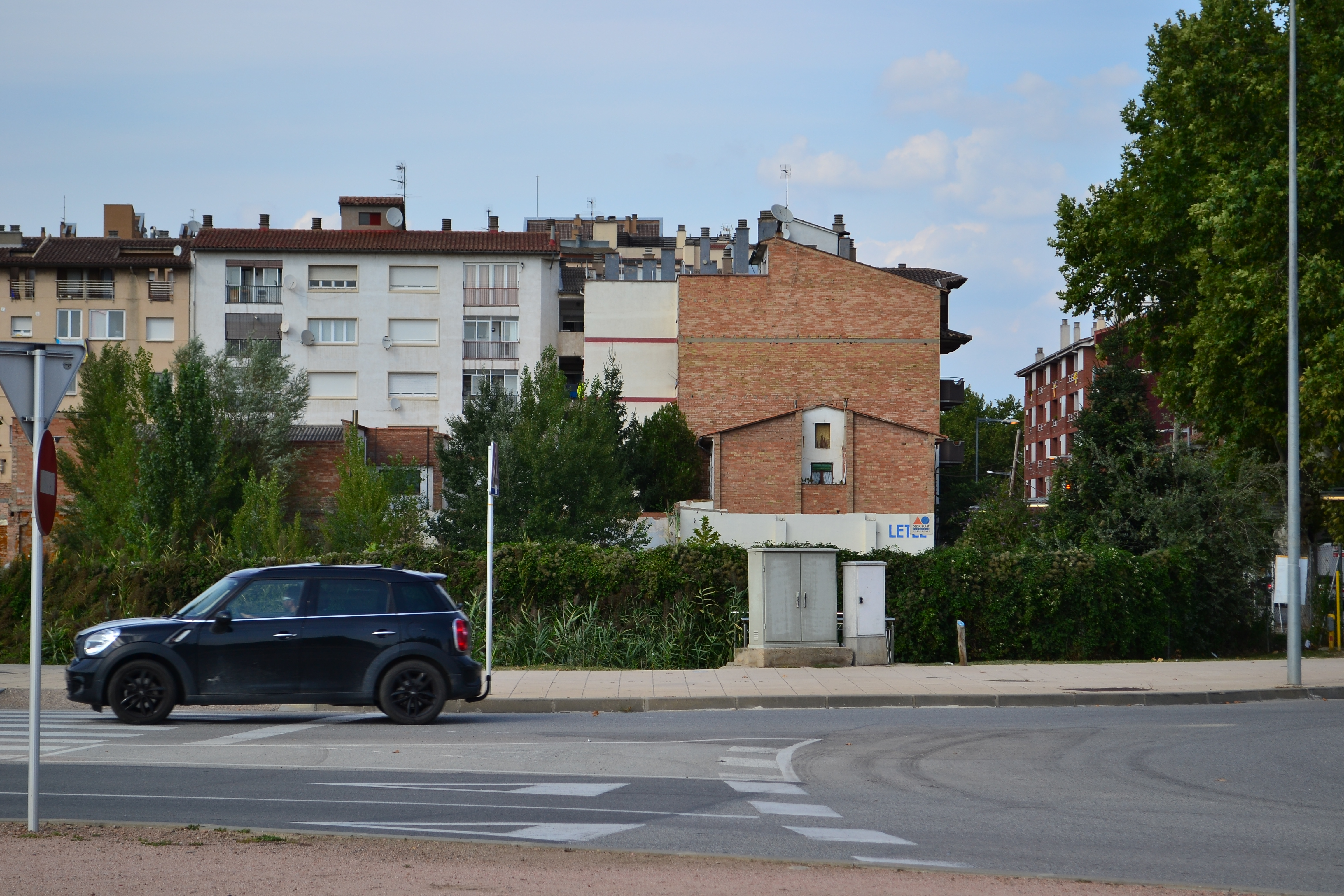 Ubicació on estava situada la fàbrica Letel. Ara és un terreny sense edificar.